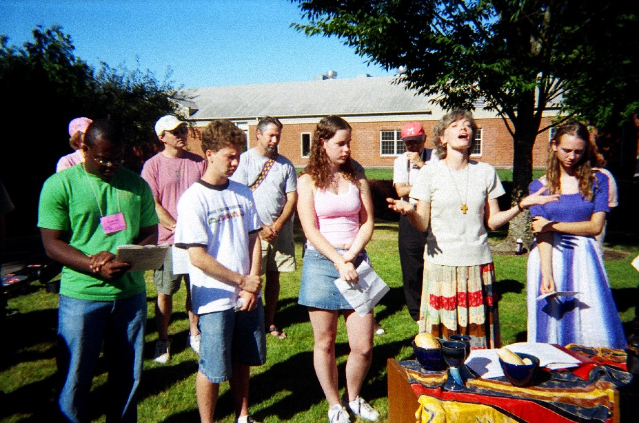 Fotita de Haruo je 2005.08.06 en McMinnville, Oregono Ros' Haruo: "Kompreneble mi rajtigas Creative Commons uzi tiun foton, kaj jes, mi mem fotis ĝin."